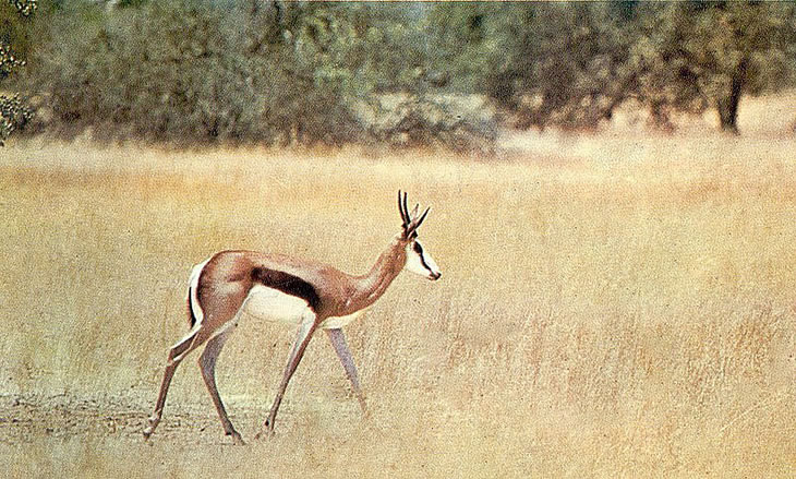 Antidorcas marsupialis angolensis